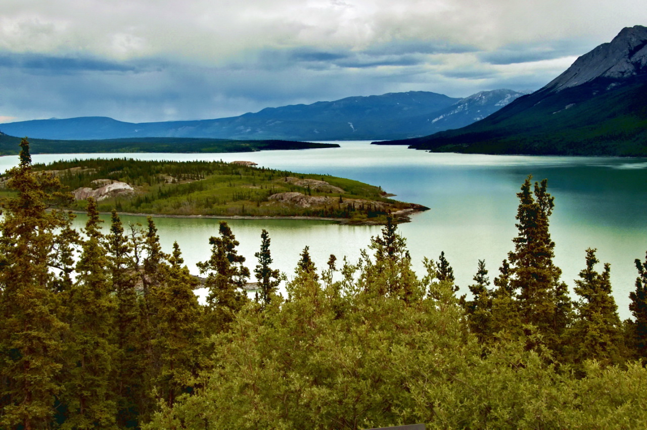 Yukon River Canada